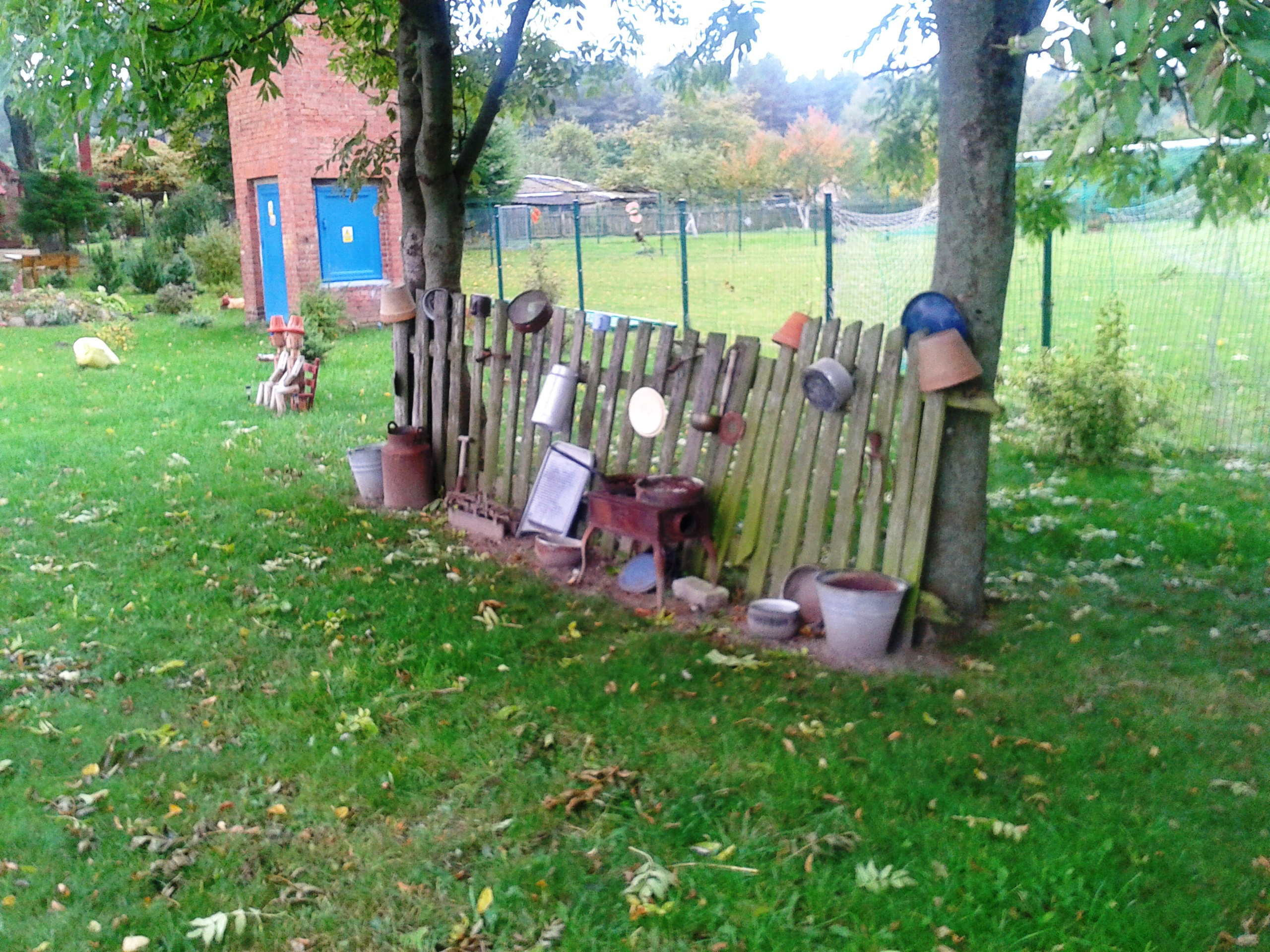 Łobżany 9